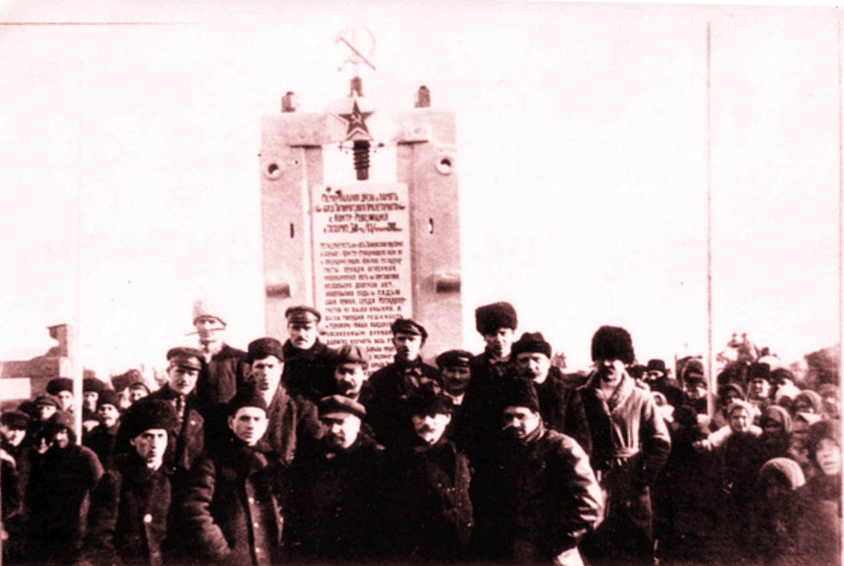 Открытие Памятник «В память о революции 1905 года», Таганрог.